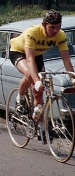 Daniel Van Ryckeghem in een Belgische koers (1967)